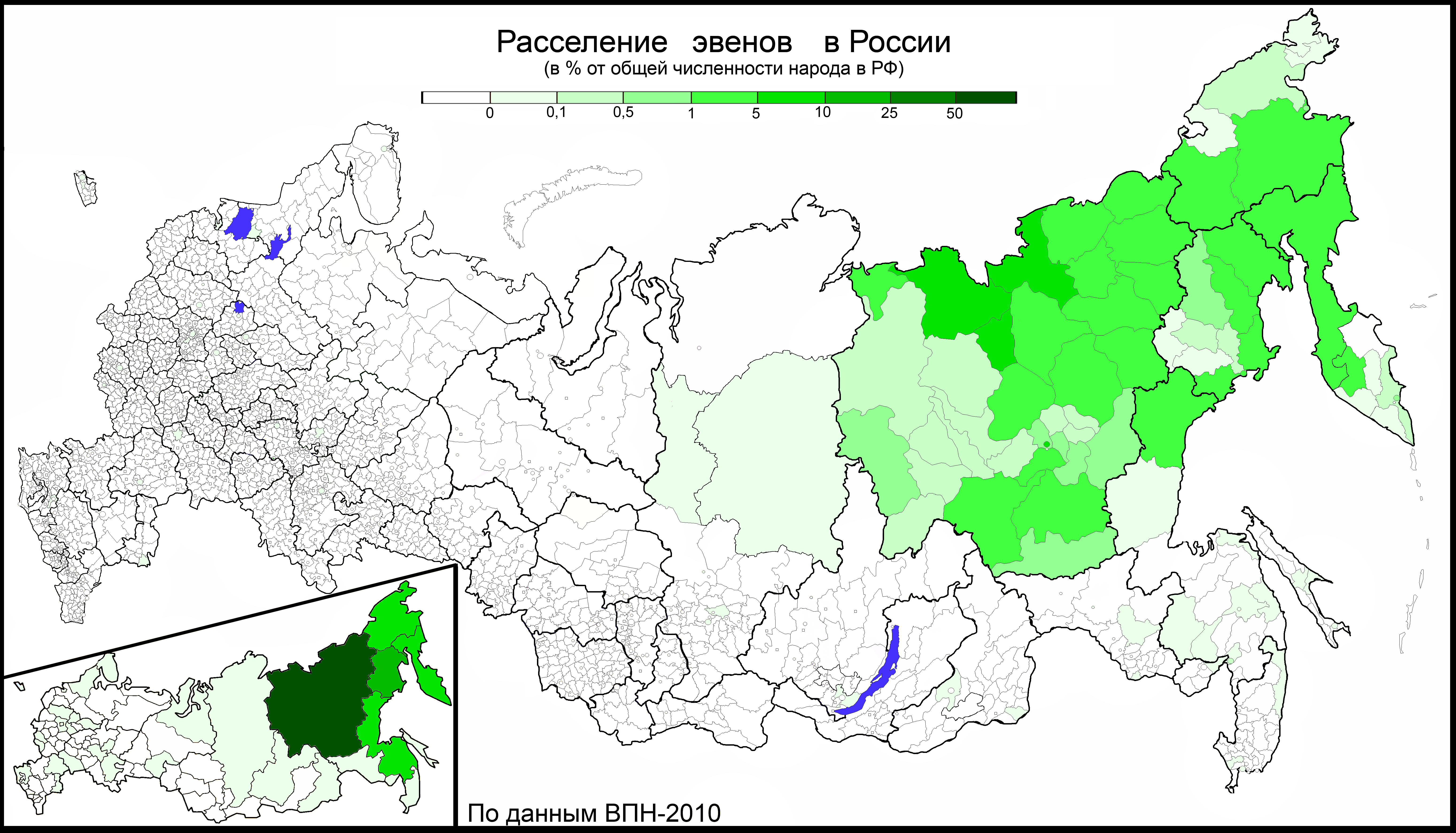 Расселение эвенов в России по муниципальным районам и городским округам в % от общей численности этого народа в РФ. По переписи 2010 года